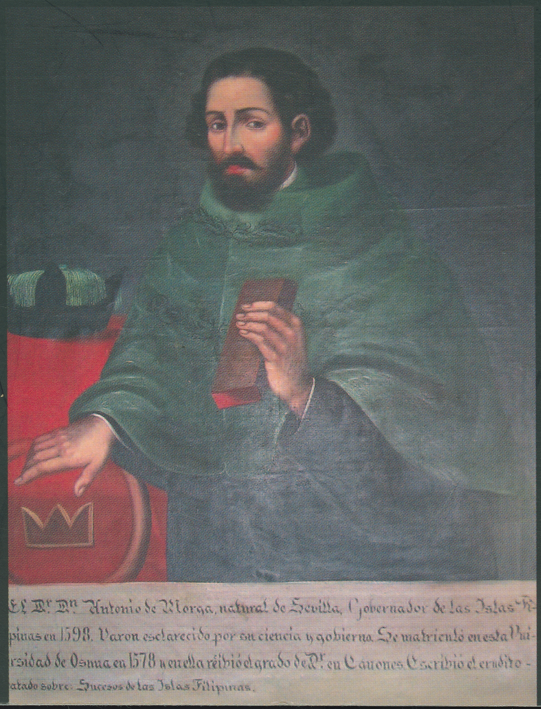 Imagen de escáner cuyo contenido conforma el protganismo superior de una portada hallada en el Libro Sucesos de las Islas Filipinas que fue transcripto por la autora Francisca Perujo en una version del año 2007 y que orginalmente fue escrito por Antonio de Morga. Le leyenda inferior relata: El Doctor Don Antonio de Morga, Natural de Sevilla, Gobernador de las Islas Philipinas en 1598. Varón esclarecido por su Ciencia y Gobierno. Se matriculó en esta Universidad de Osuna en 1578 y en ella recibió el grado de Doctor en Cánones. Escribió el erudito tratado Sucesos de las Islas Filipinas. Consultado y compartido por el usuario J. Javier García A.